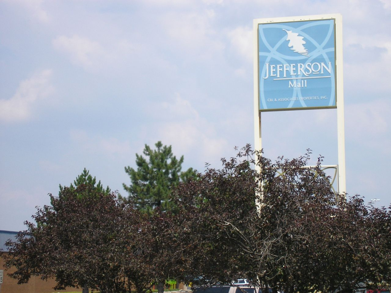 Jefferson Mall in Louisville, KY